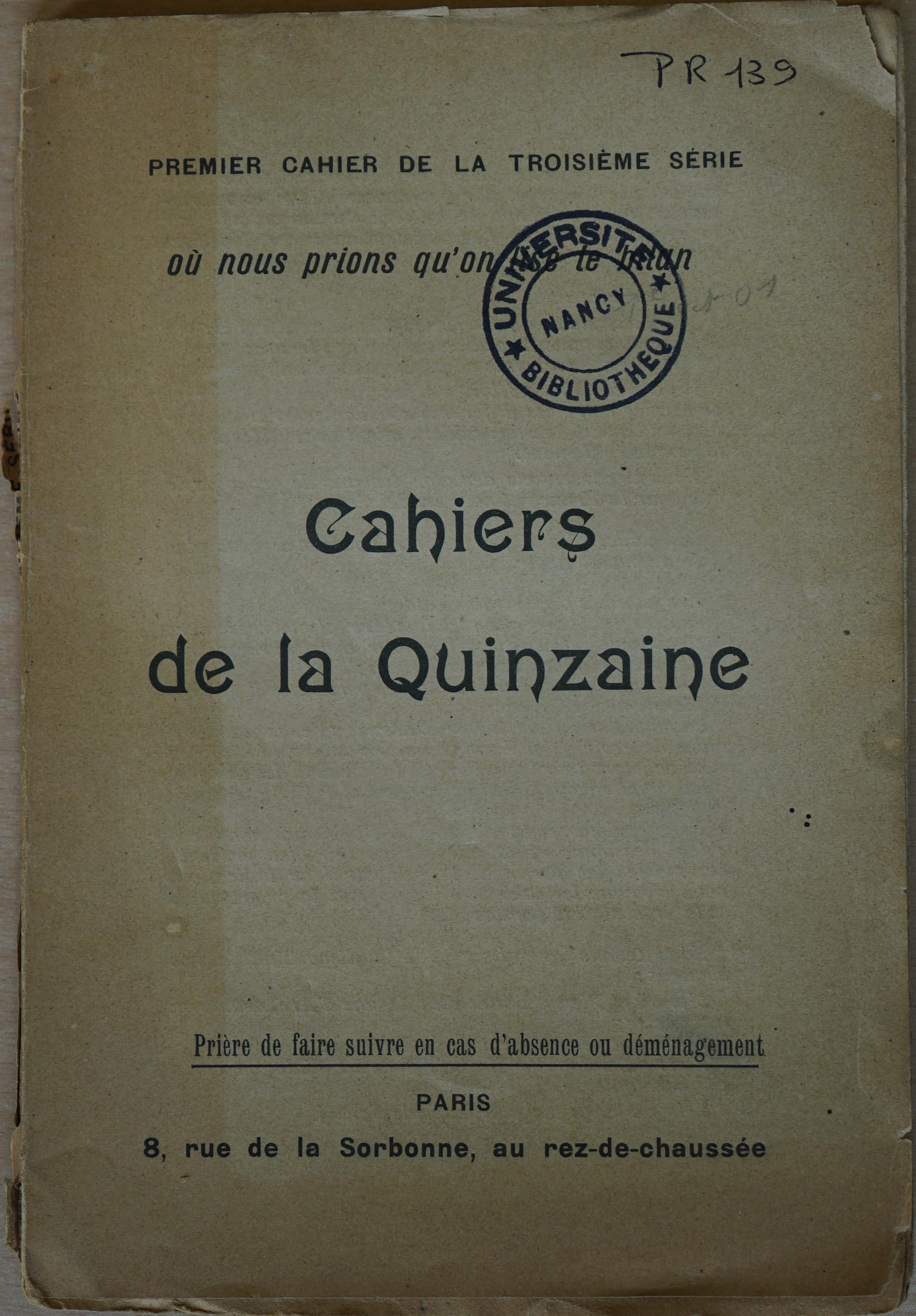 Cahiers de la Quinzaine Série 3, cahier 1.